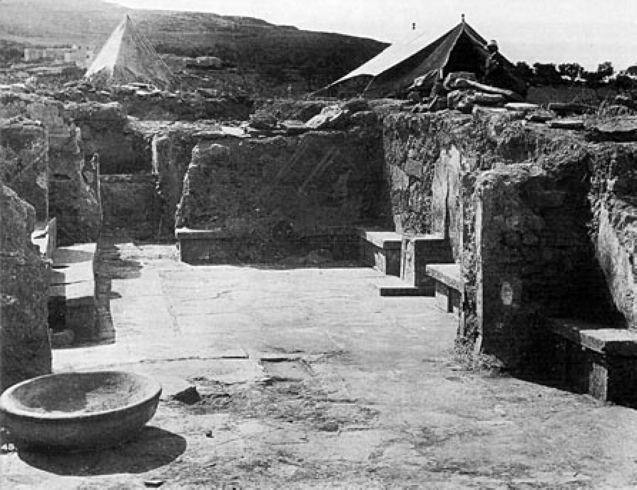 Der Thronsaal in Knossos im Jahr 1900